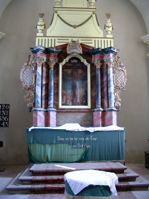 Altar der Kirchenburg Bekokten